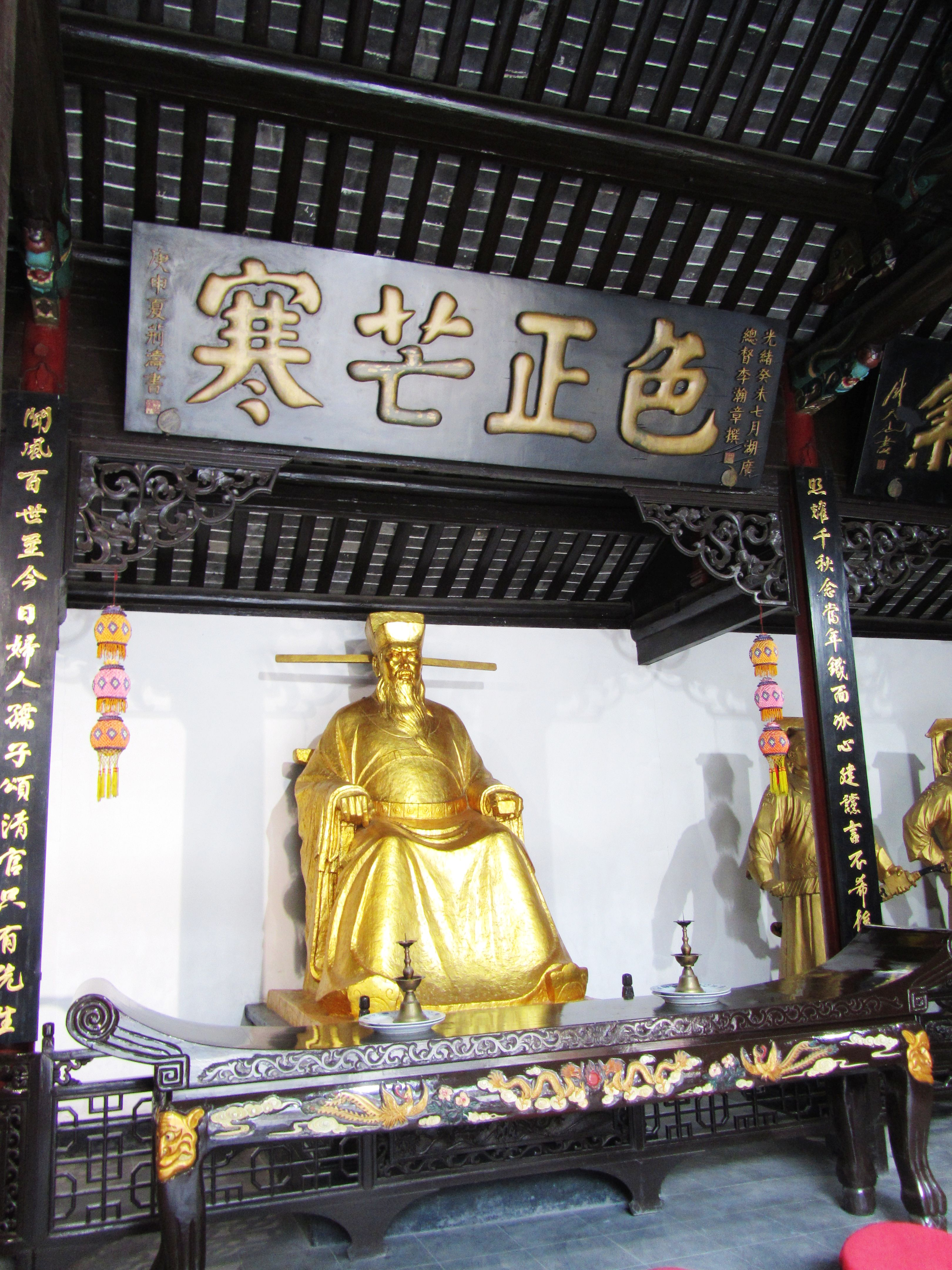 合肥包肃孝公祠内包拯像。